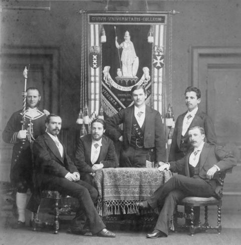 den ISSA van 1883 met onder andere Frederik van Eeden (staand midden)